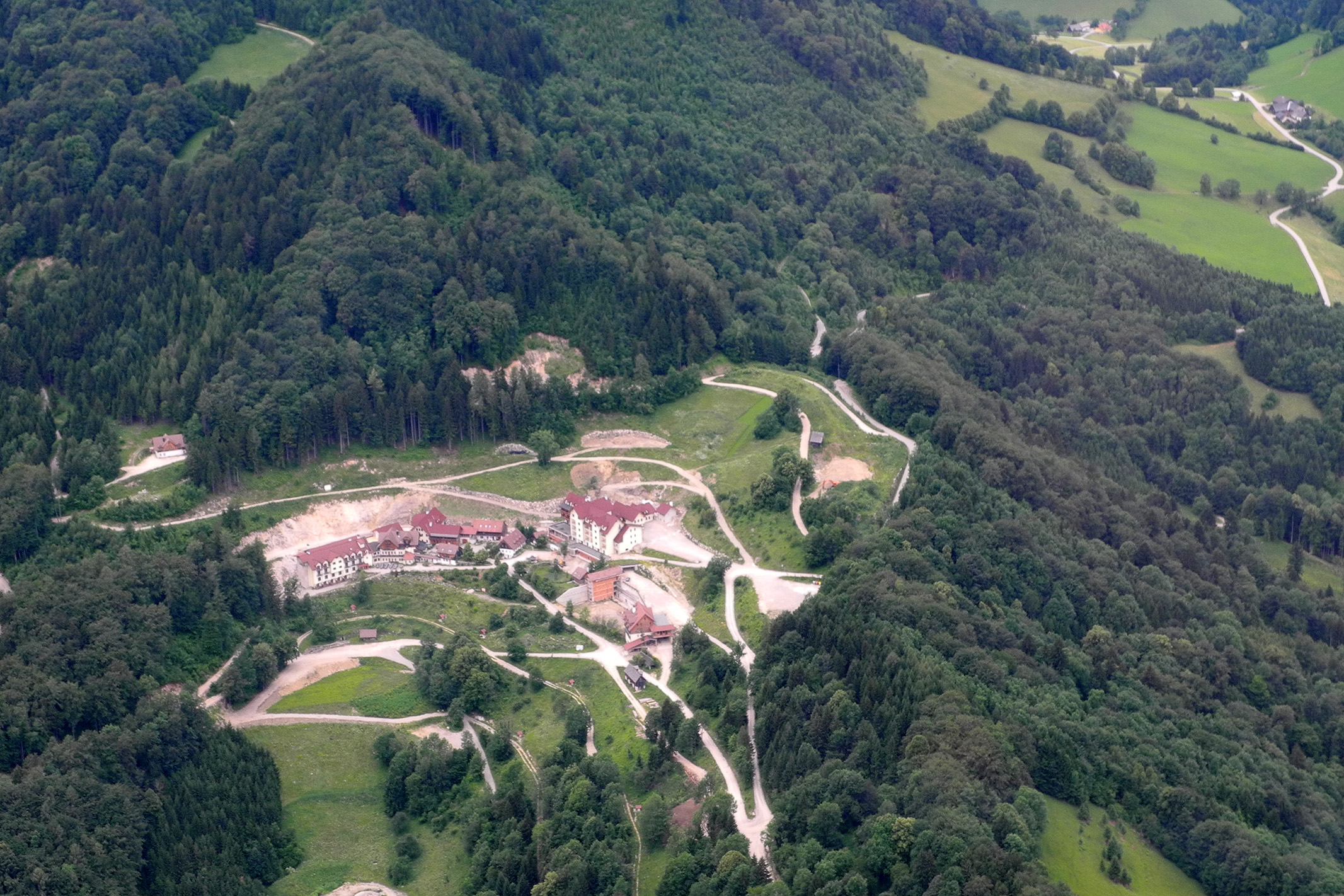 VFR Ostösterreich: Taschlgrabenrotte in Frankenfels